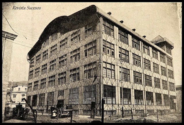 Edificio Hucke, Valparaíso Fotografía publicada en Revista Sucesos, 1910